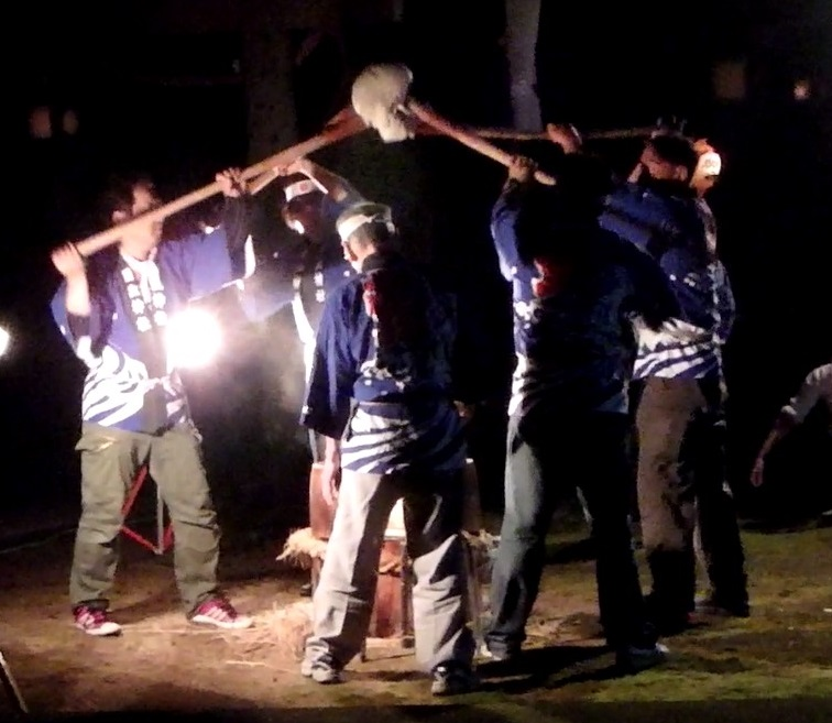 兵庫県豊岡市但東町南尾で行われる「千本餅つき」で、杵が突き上げられている瞬間。